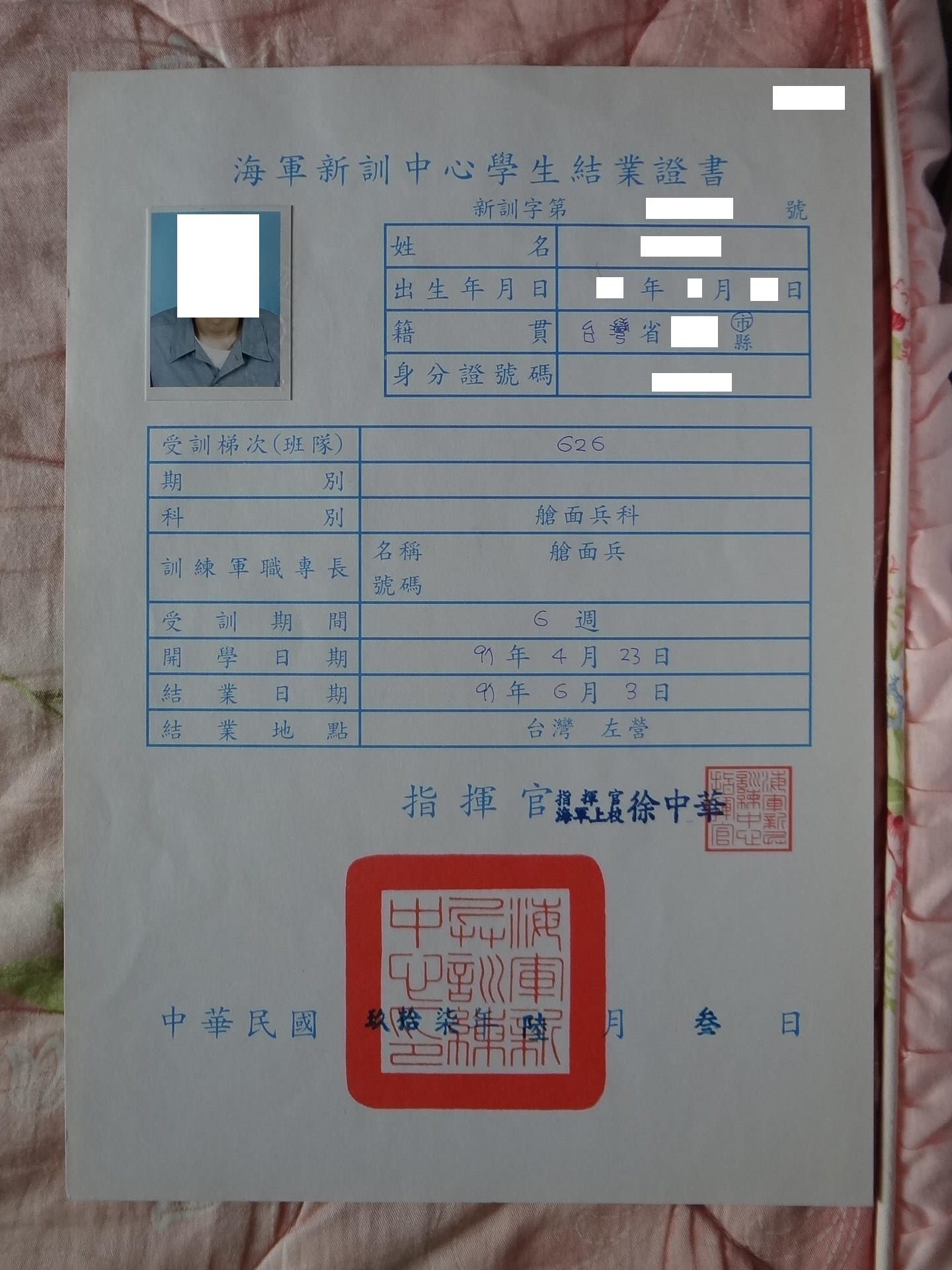 中華民國海軍新兵訓練中心626梯次學生結業證書